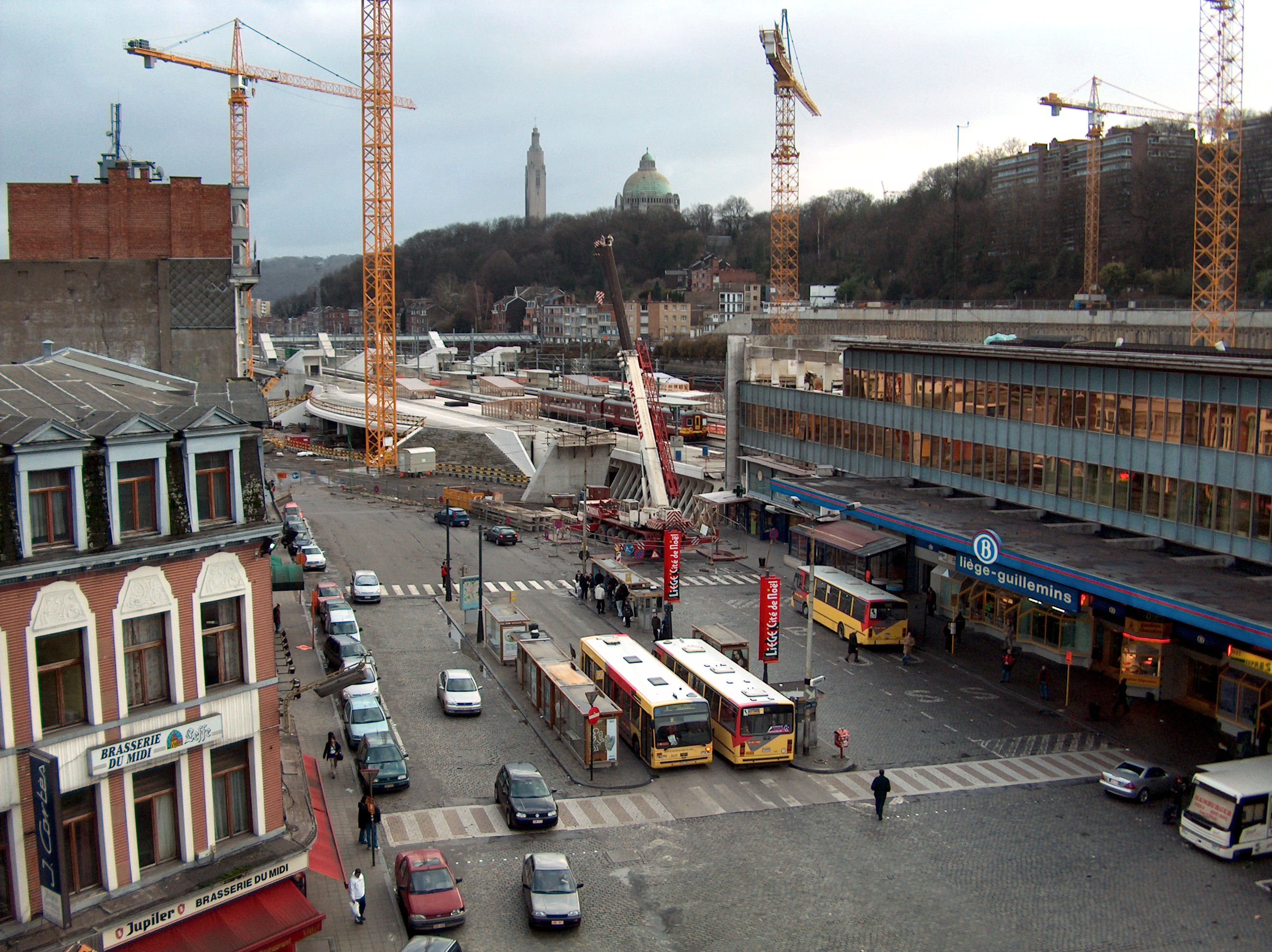 Photo personnelle (Claude Warzée décembre 2003) des travaux TGV de la gare des Guillemins de Liège (Belgique). Le mémorial interallié est visible dans le fond.